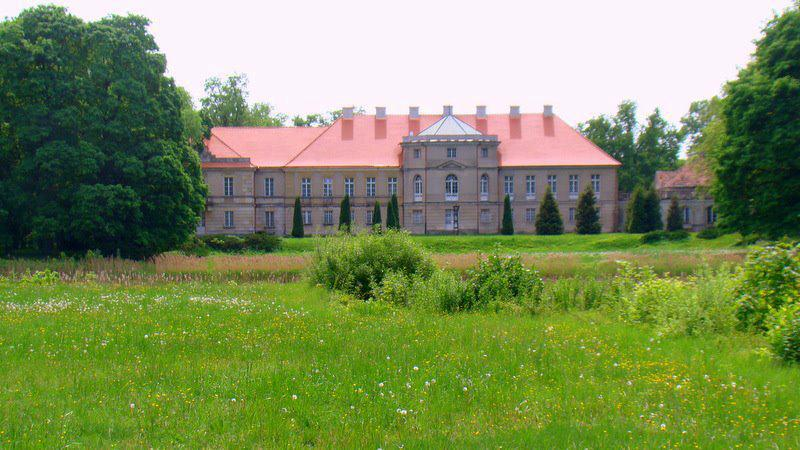 Czerniejewo - zespół pałacowy z XVIII-XX w.: Pałac Lipskich (zabytek nr 3/A)